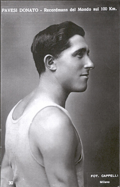 Il marciatore italiano Donato Pavesi fotografato in occasione del record del mondo della 100 km di marcia.